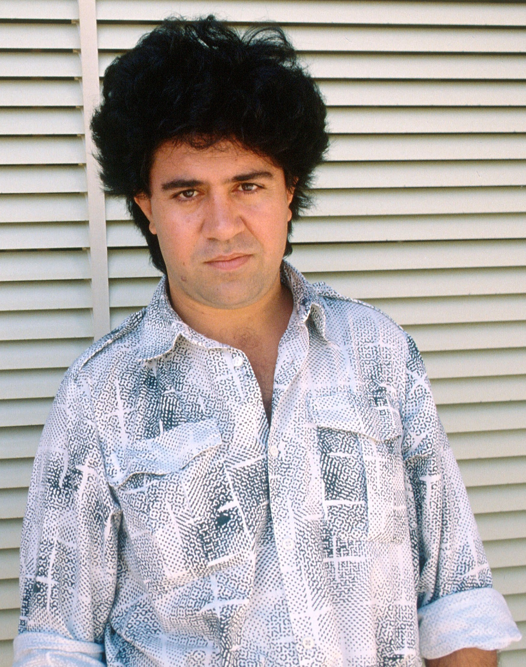 Detalle de una fotografía mayor que muestra al director de cine español Pedro Almodóvar durante la celebración del Festival de Cine de Venecia de 1988